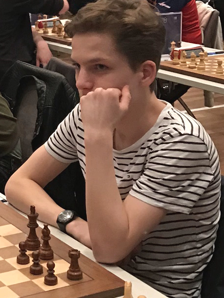 Luis Engel, Runde 9 der Grenke Chess Open 2019 in Karlsruhe.